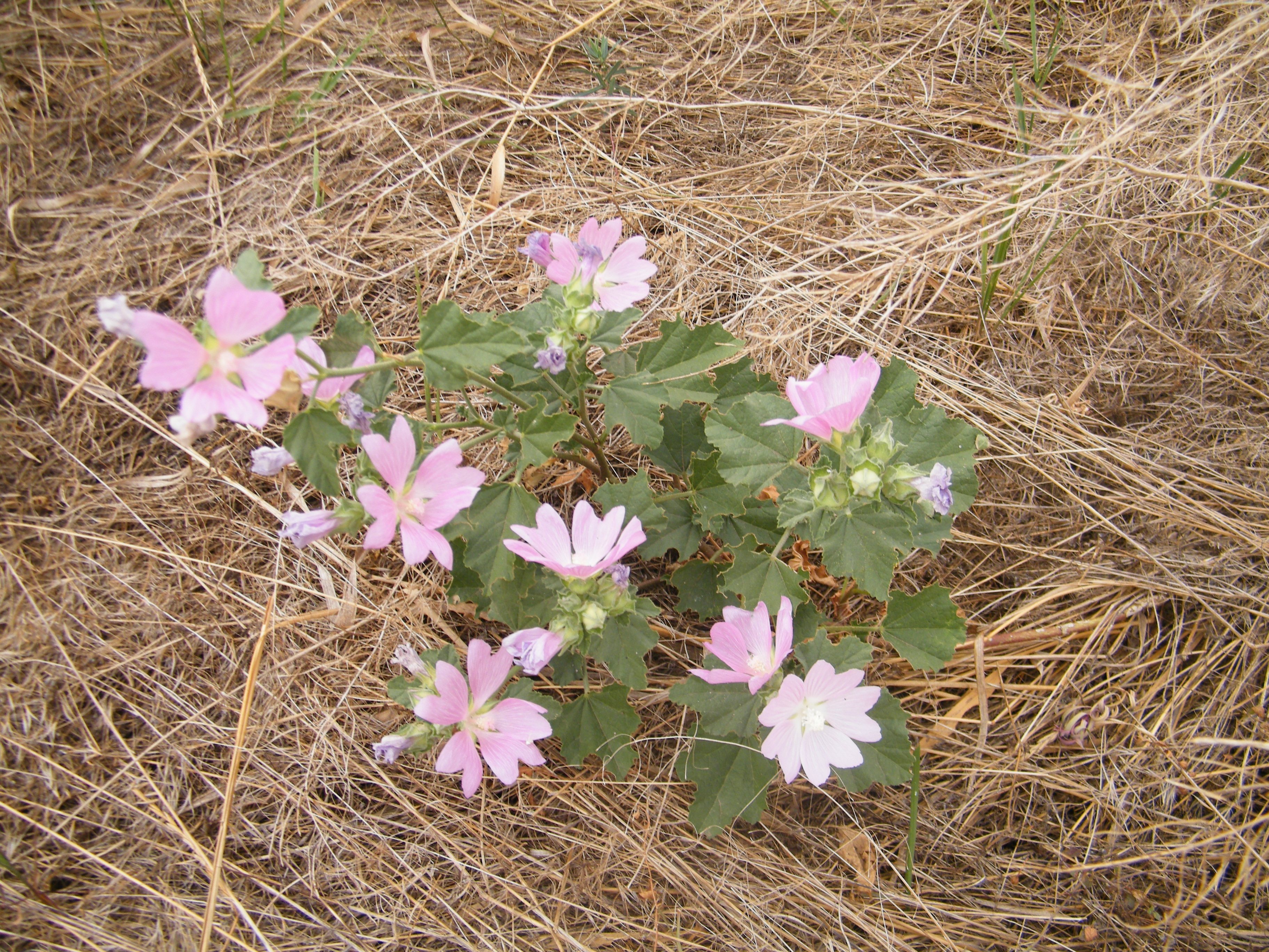 Флора села Осетрівка